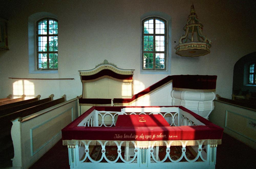 Mikepércs,templombelső.